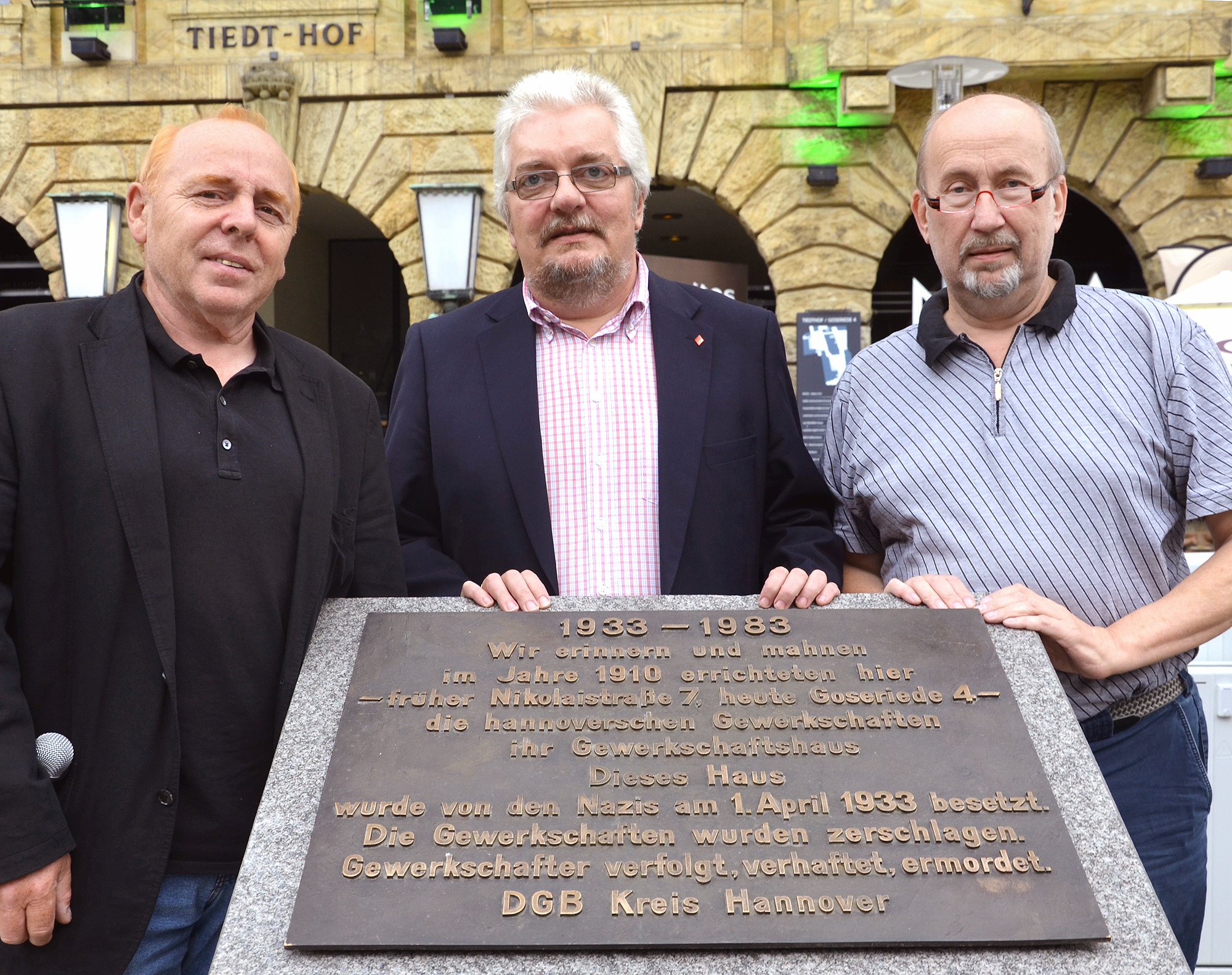 Nach der Umgestaltung des Platzes Goseriede ließ der Deutsche Gewerkschaftsbund bzw. der DGB Kreis Hannover einen neuen Gedenkstein vor dem heute Tiedthof genannten ehemaligen Gewerkschatshaus des Allgemeinen Deutschen Gewerkschaftsbundes aufstellen, diesmal besser lesbar und mit der Blickrichtung auf das alte Gewerkschaftsebäude. Nach der Gedenkveranstaltung des neuen Gedenksteines Altes Gewerkschaftshaus Hannover|Gedenksteines Altes Gewerkschaftshaus am 13. August 2014 nahmen die Redner für die Fotografen Aufstellung; von links: Tom Seibert (Regionssekretär), Reiner Eifler (Regionsgeschäftsführer) sowie Steffen Holz (Regionssekretär) ...